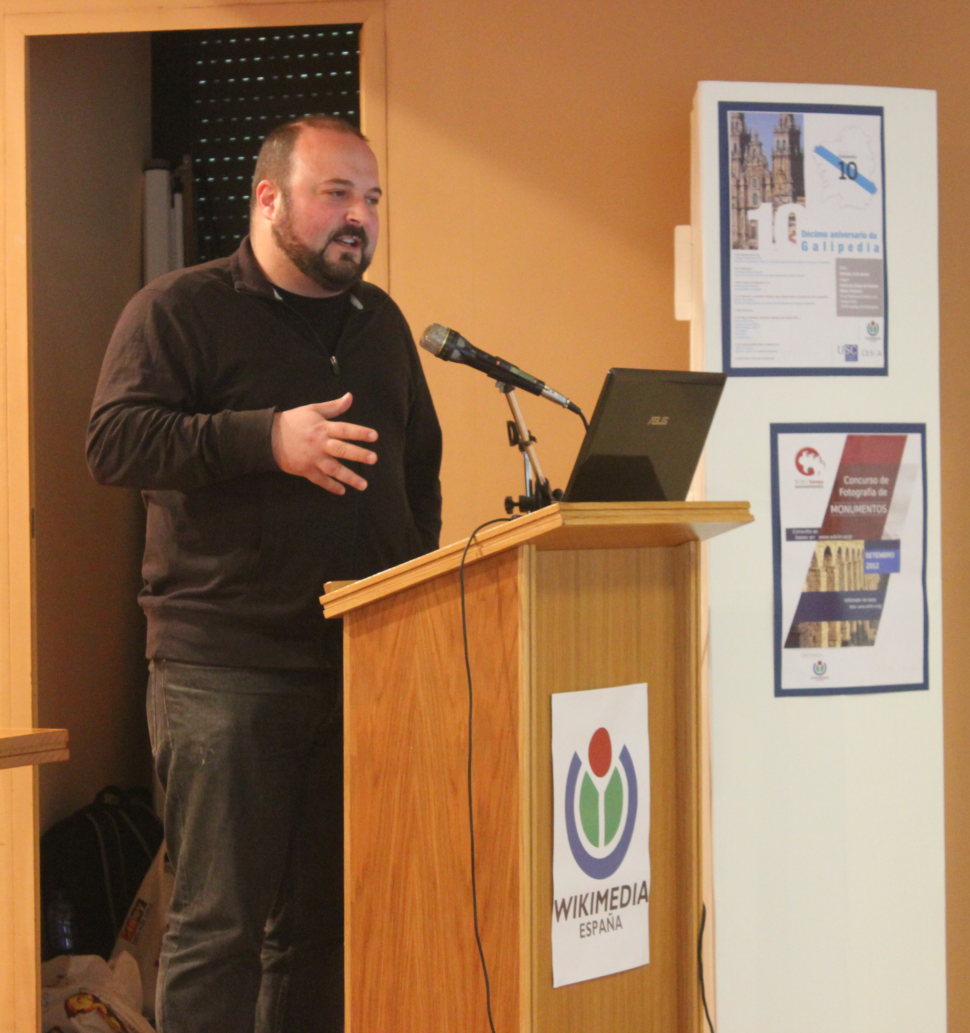 Manuel Gago nos actos do 10º aniversario da Galipedia, en Santiago de Compostela.